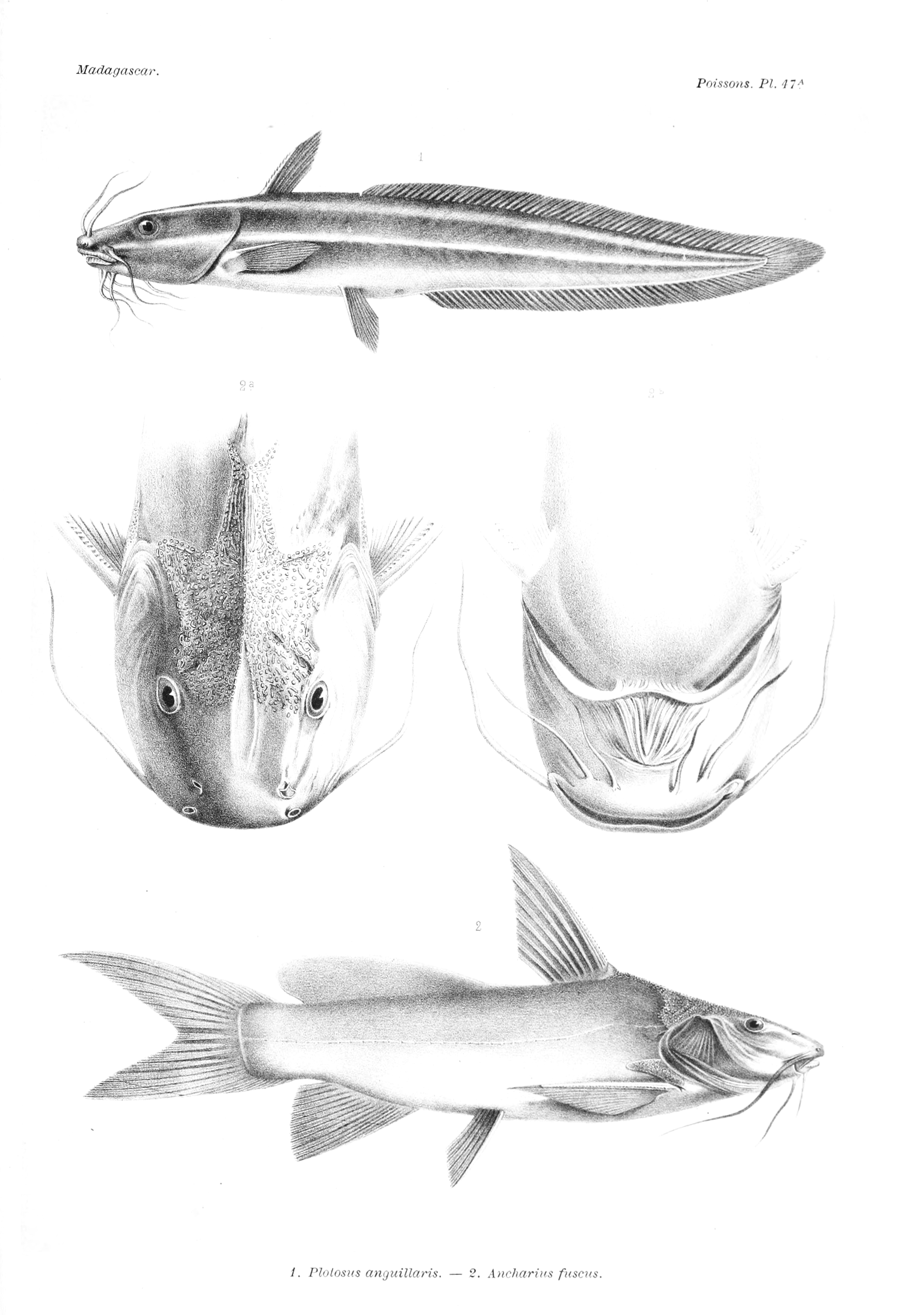 Plotosus anguillaris = Plotosus lineatus Ancharius fuscus